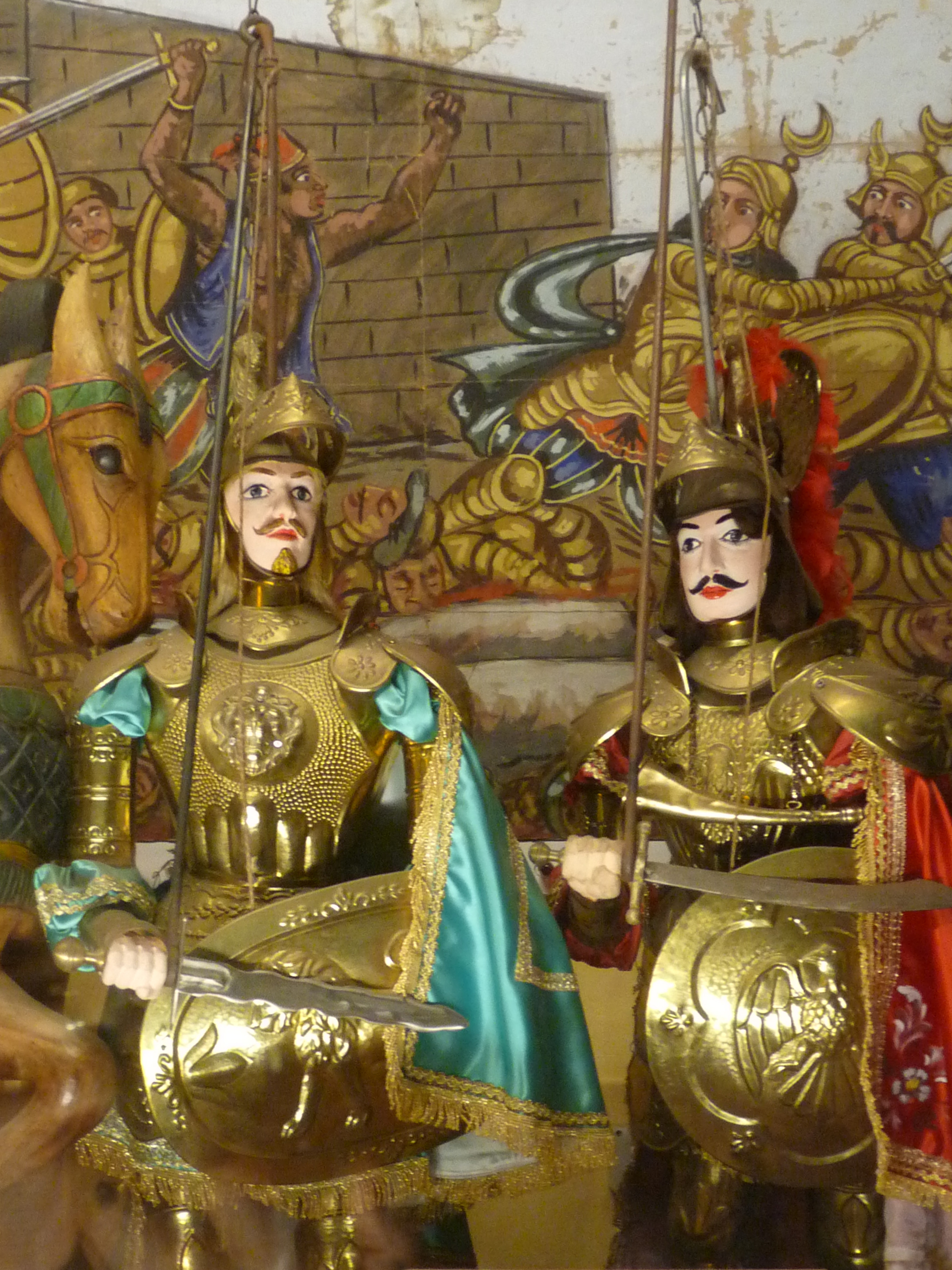 Rinaldo et Orlando (Renaud et Roland), personnages du théâtre de marionnettes sicilien (Musée ethnographique éolien, Lipari)